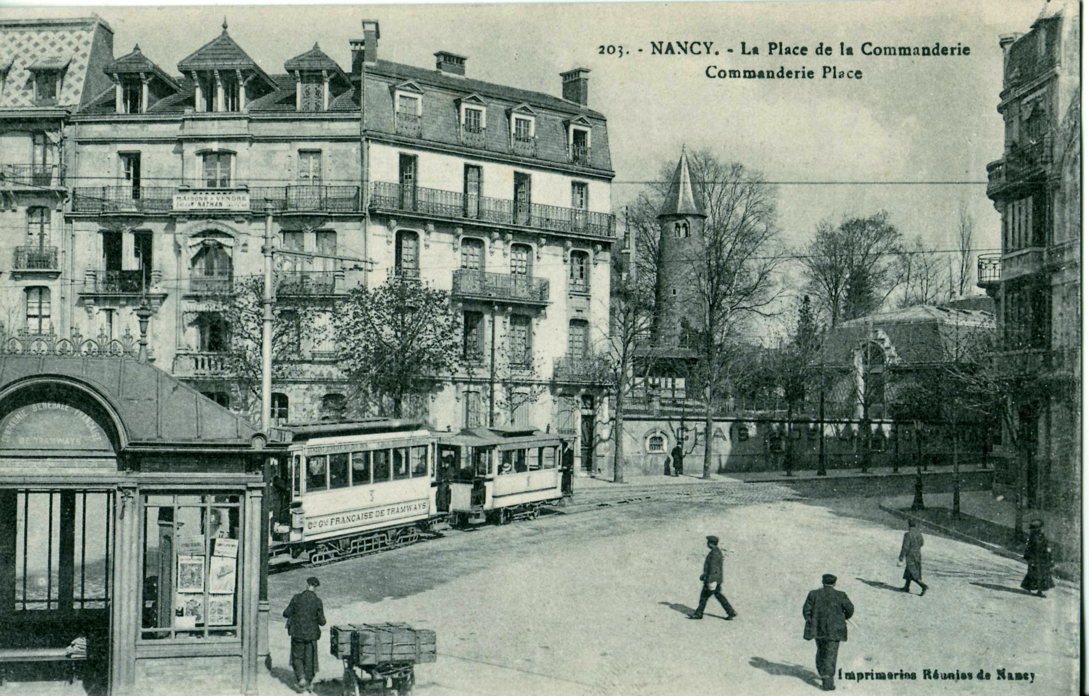 Carte postale ancienne éditée par les Imprimeries réunies de Nancy, n°203 :NANCY - La Place de la Commanderie